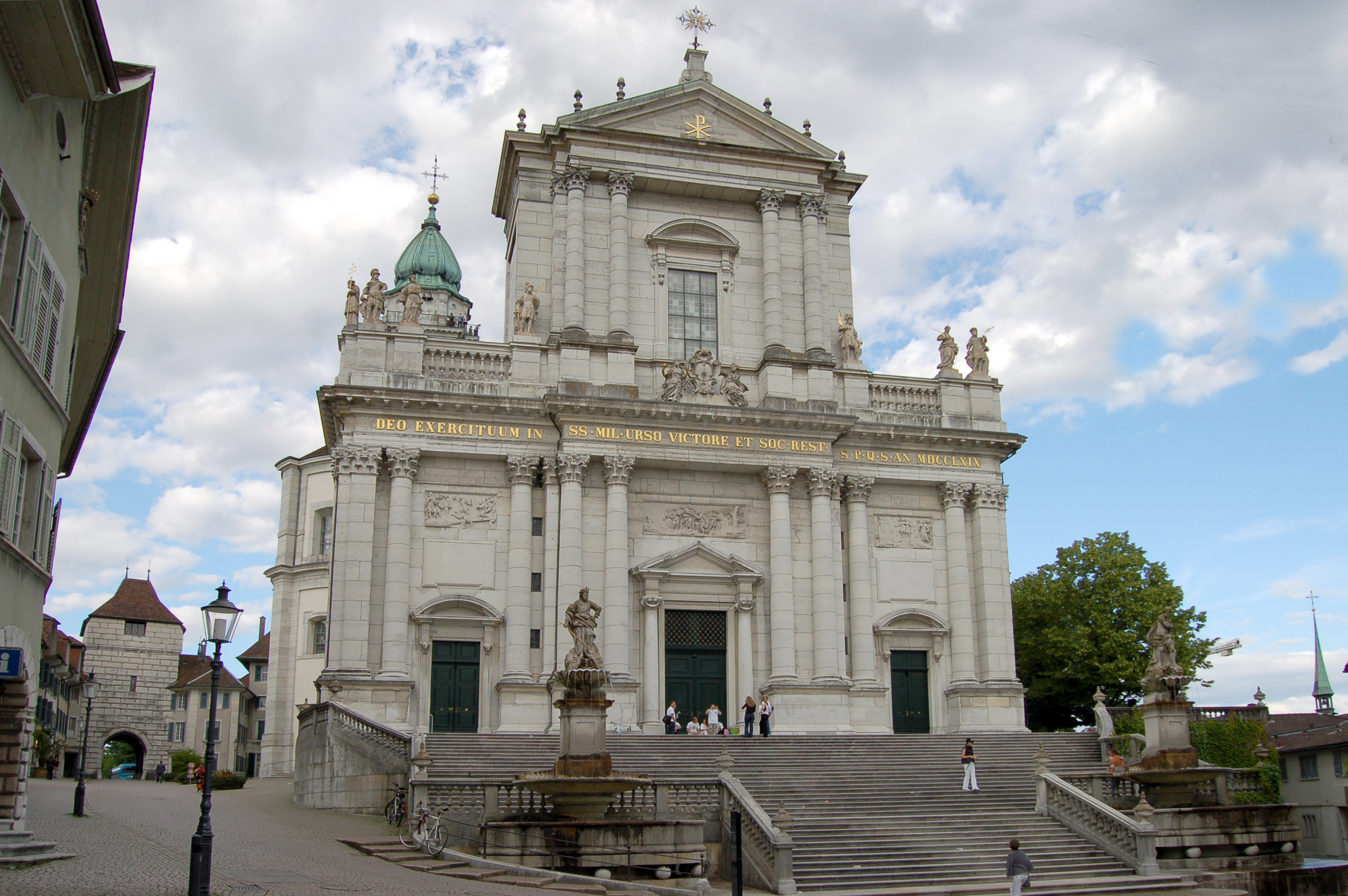 St. Ursenkatherale mit 11-er Stufen Serie